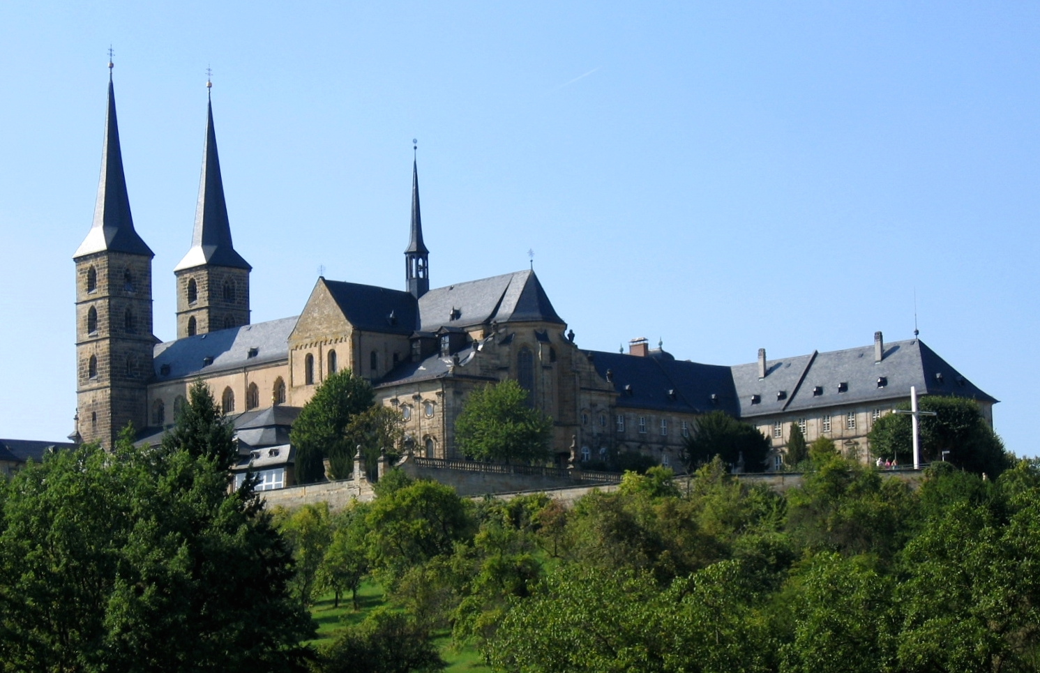 Description: Ehemalige Benediktinerabtei und Klosterkirche St. Michael in Bamberg (Germany) Source: selbst fotografiert Date: 4. Sept. 2005 Author: Asio otus